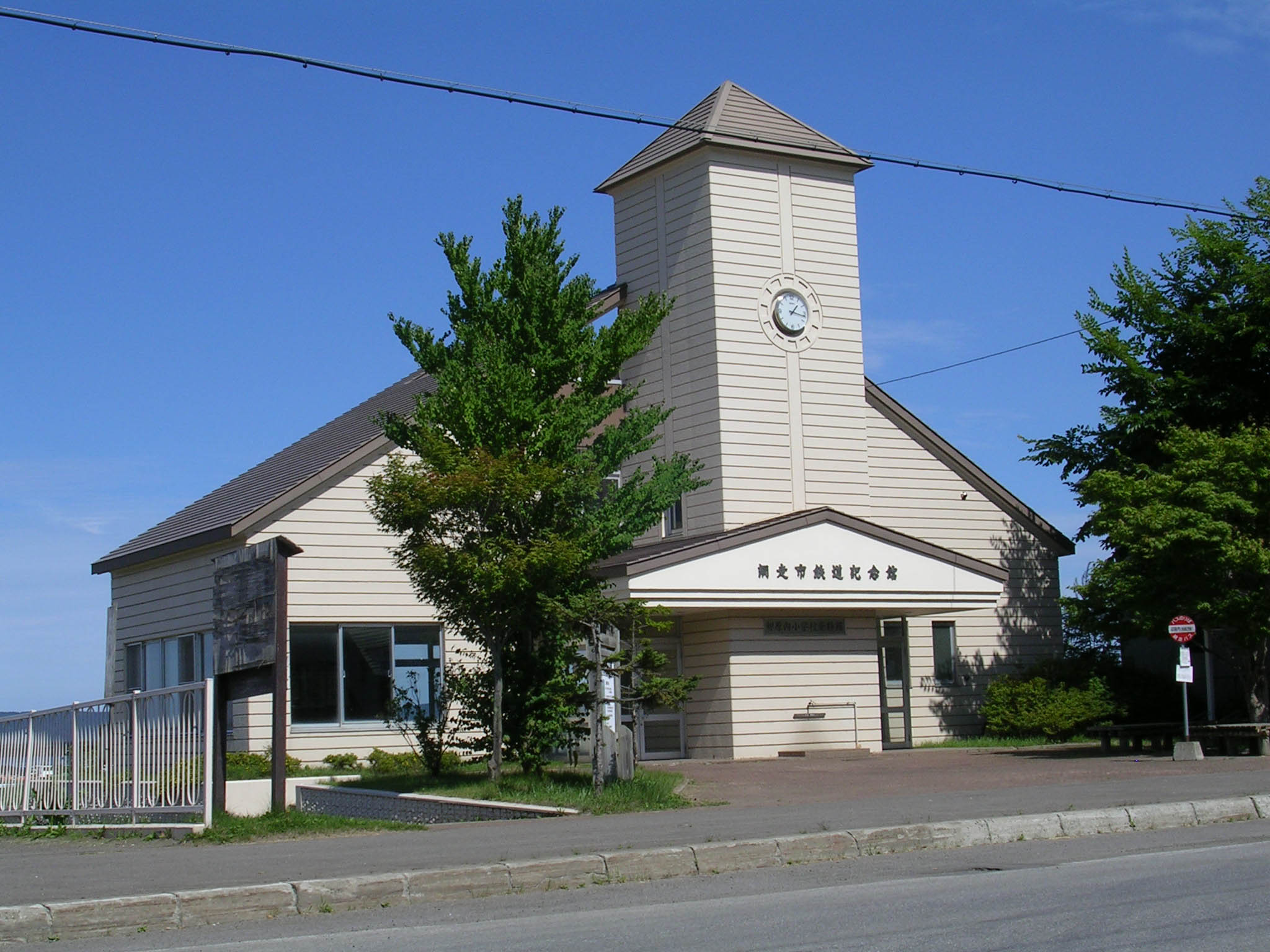 網走市鉄道記念館（卯原内駅跡）